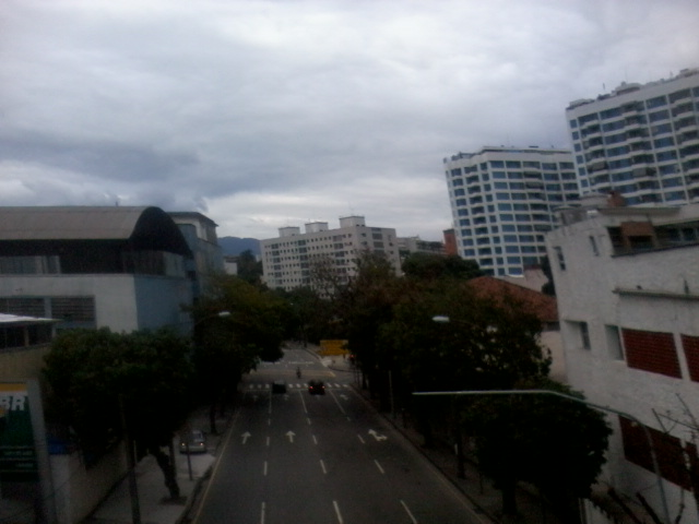 Local no qual o Elevado Paulo de Frontin passa em cima da Rua João Paulo I, no bairro do Rio Comprido, Rio de Janeiro.